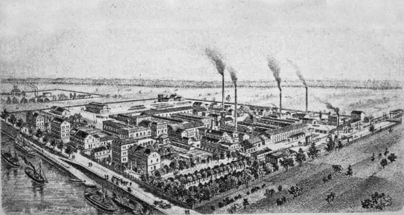 C. F. Boehringer & Söhne GmbH, Mannheim-Waldhof, Sandhofer Str.